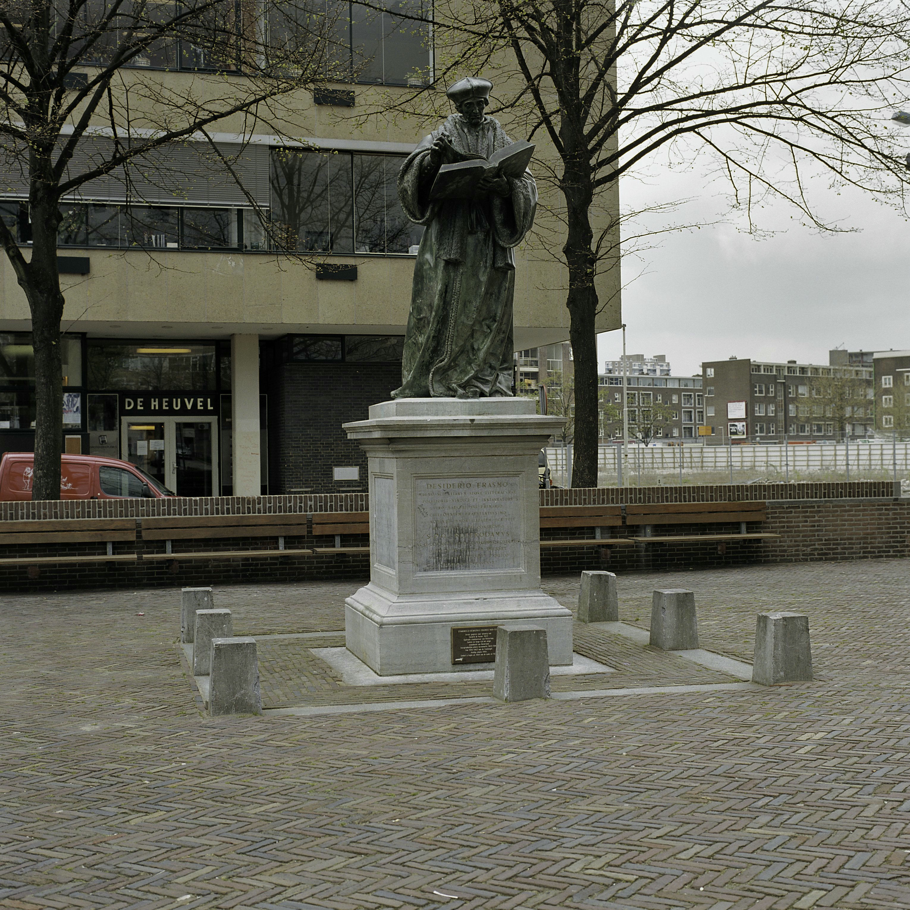 Standbeeld: Standbeeld van Erasmus (opmerking: Gefotografeerd voor Monumenten In Nederland Zuid-Holland)